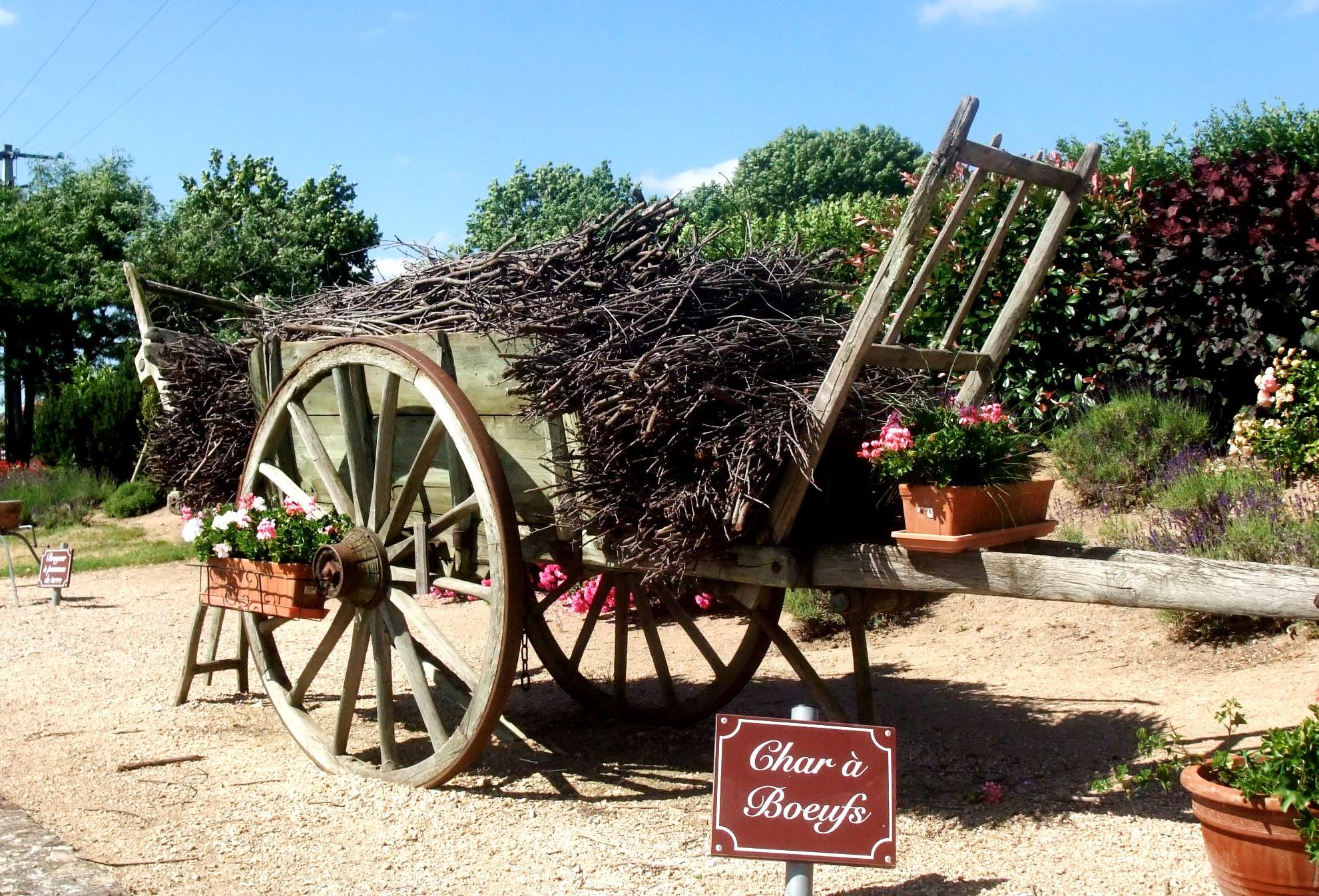 Roiffieux char à boeufs